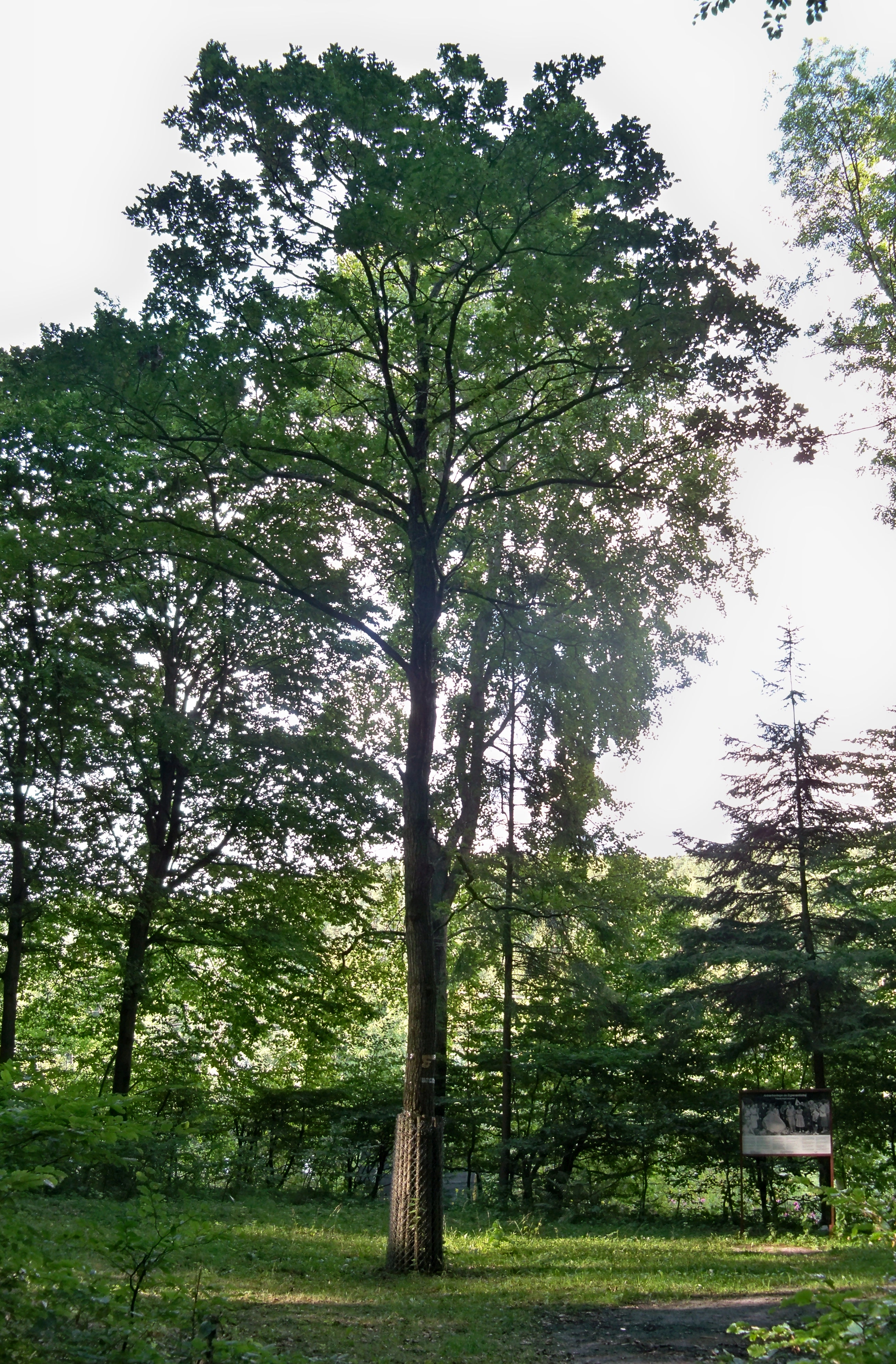 Dąb esperantystów w Sopocie (Świemirowo) posadzony w 1959 r.